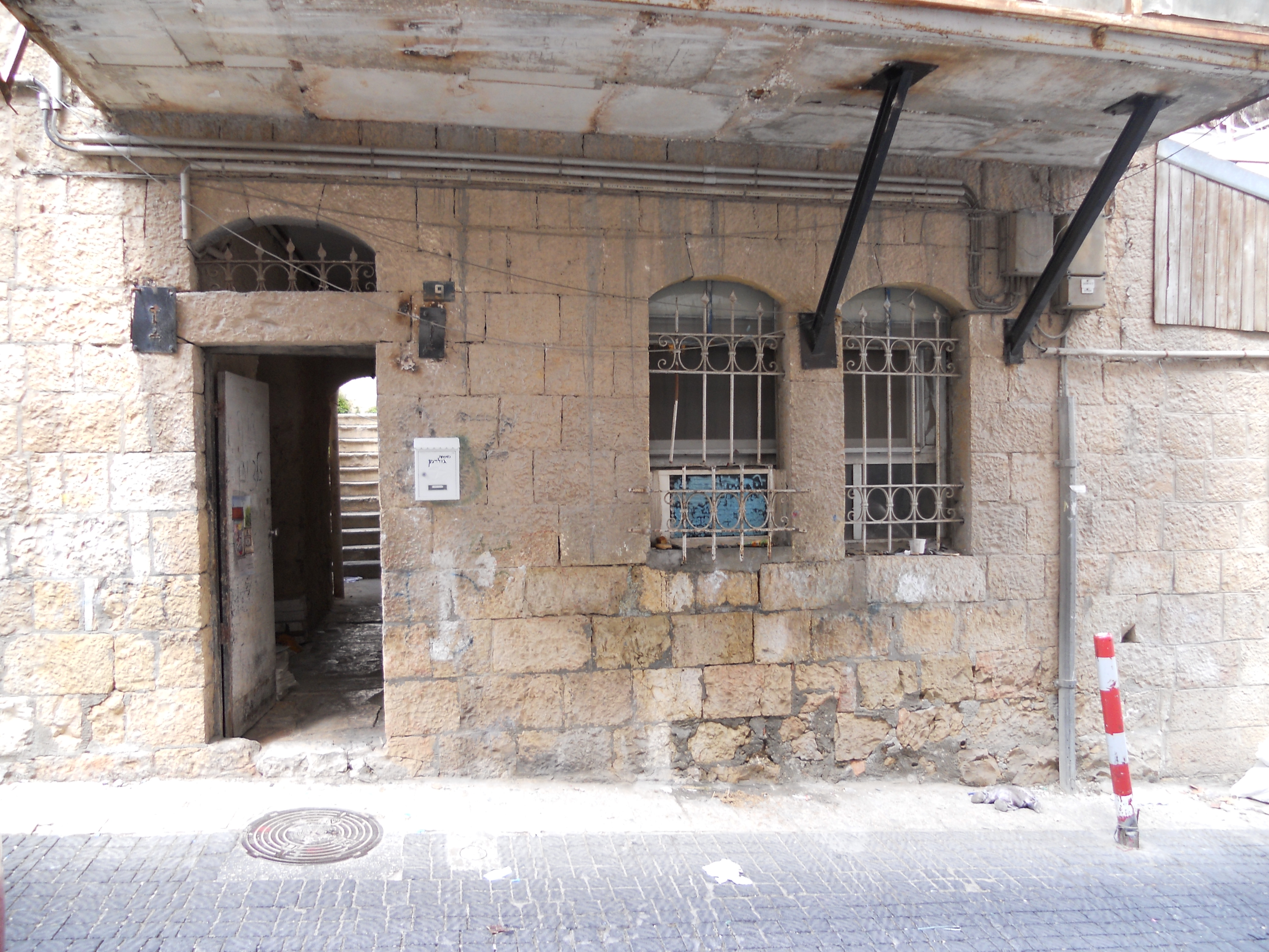 שכונת בית ישראל בירושלים רחוב שאול עבוד תשע"ב